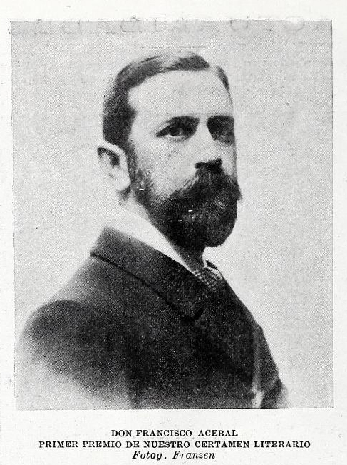 Francisco Acebal.